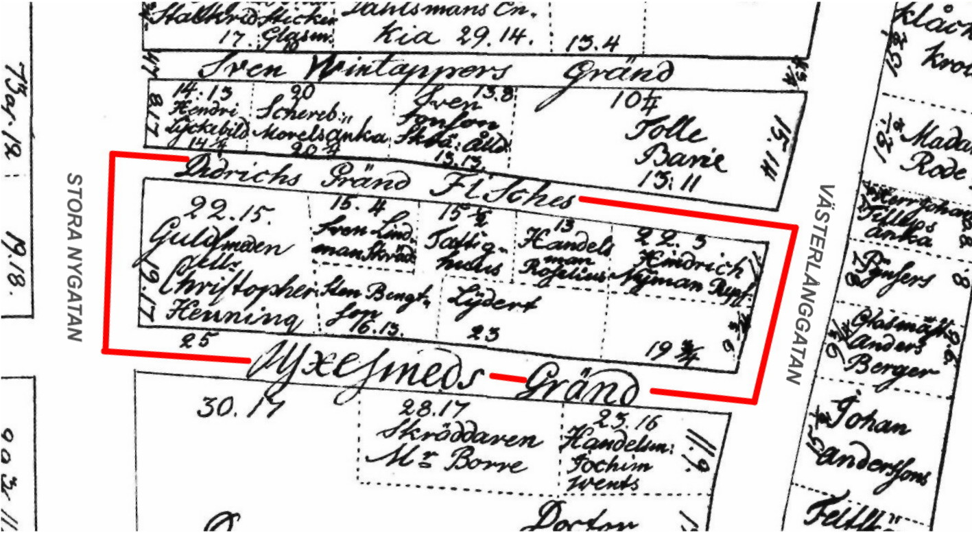 Tomtkarta nordvästra Gamla stan visande kvarteret Iphigenia 1693